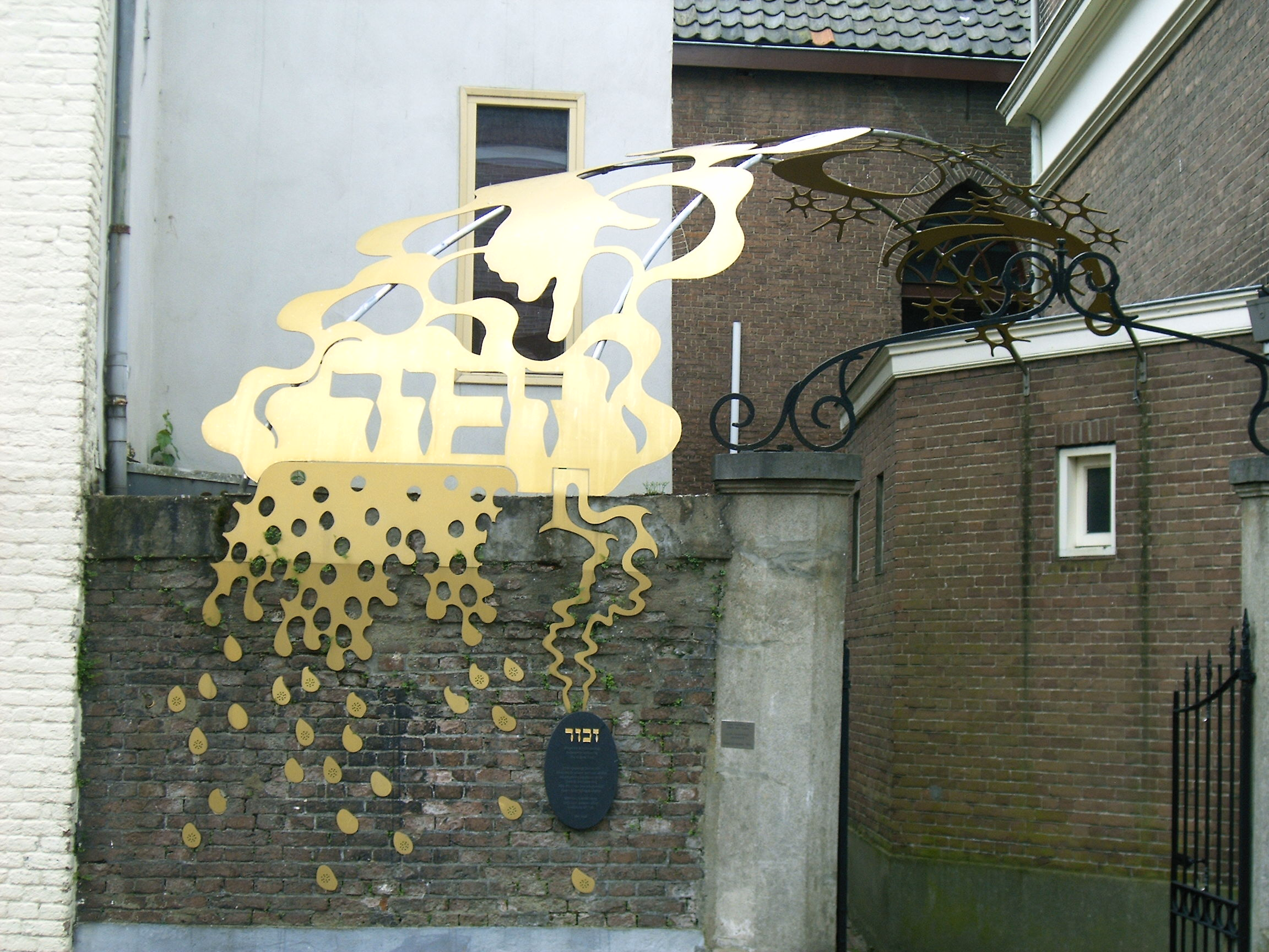 Joods monument Sint Agnietenstraat 28-32 Tiel NL